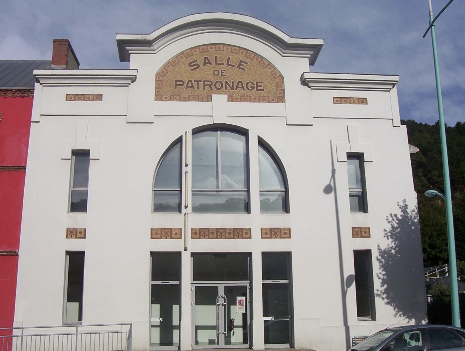 Cherbourg, France : Ancienne salle de patronage, et cinéma Le Vox. Avenue de Paris, quartier du Roule.